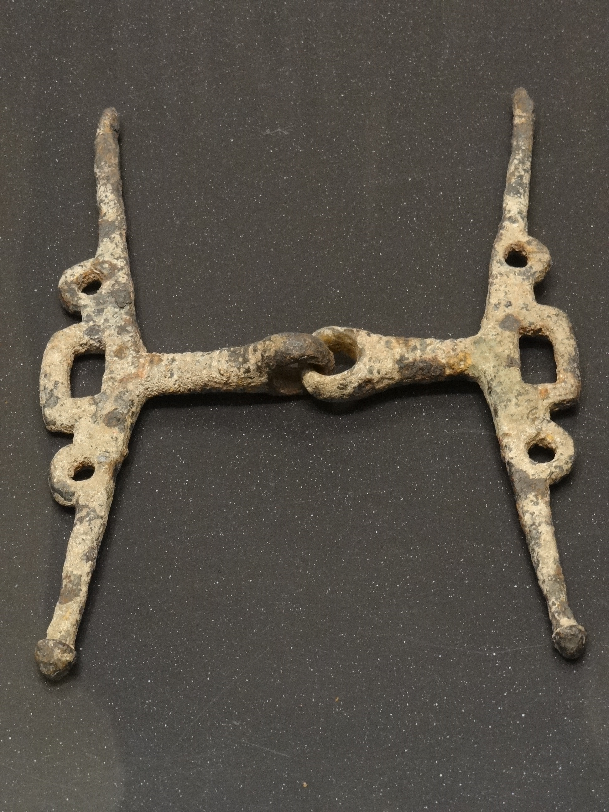 Mors brisé à montants latéraux perforés, en bronze et datant du second Âge du Fer (musée du Louvre).